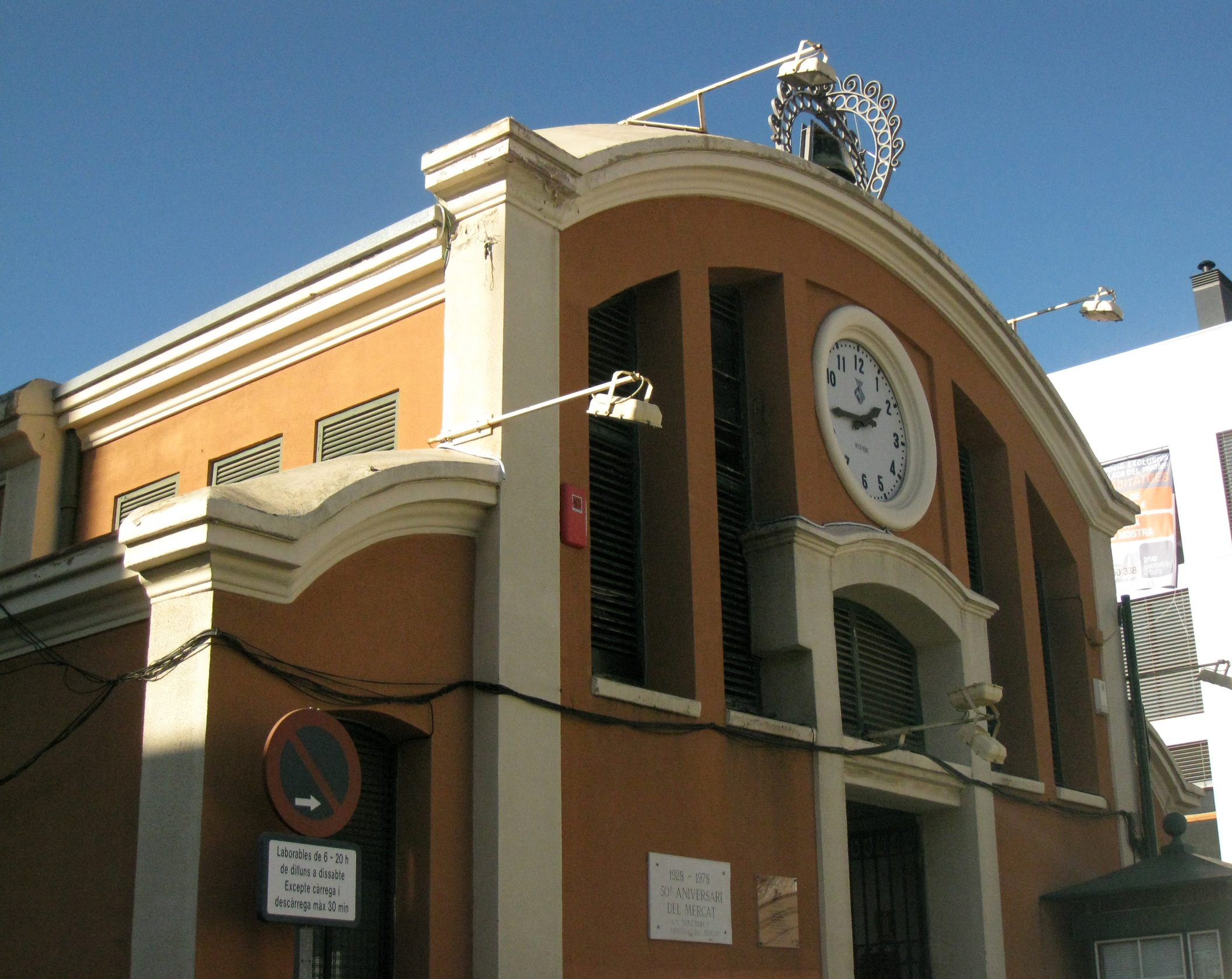 Mercat del Triomf (Terrassa), al barri de Sant Pere. Obra de Melcior Viñals de 1928.